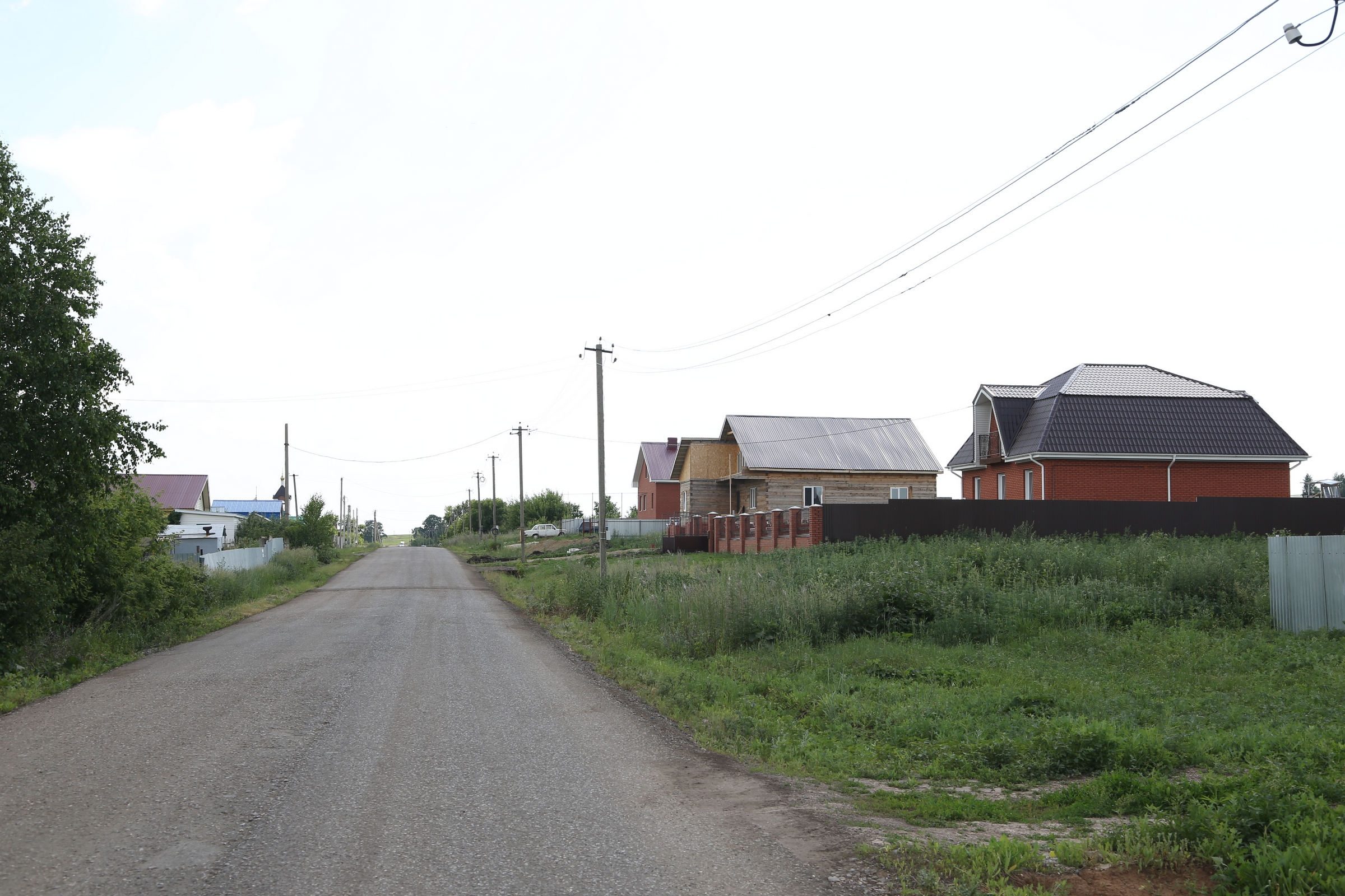 Теперь в селе асфальтовая дорога